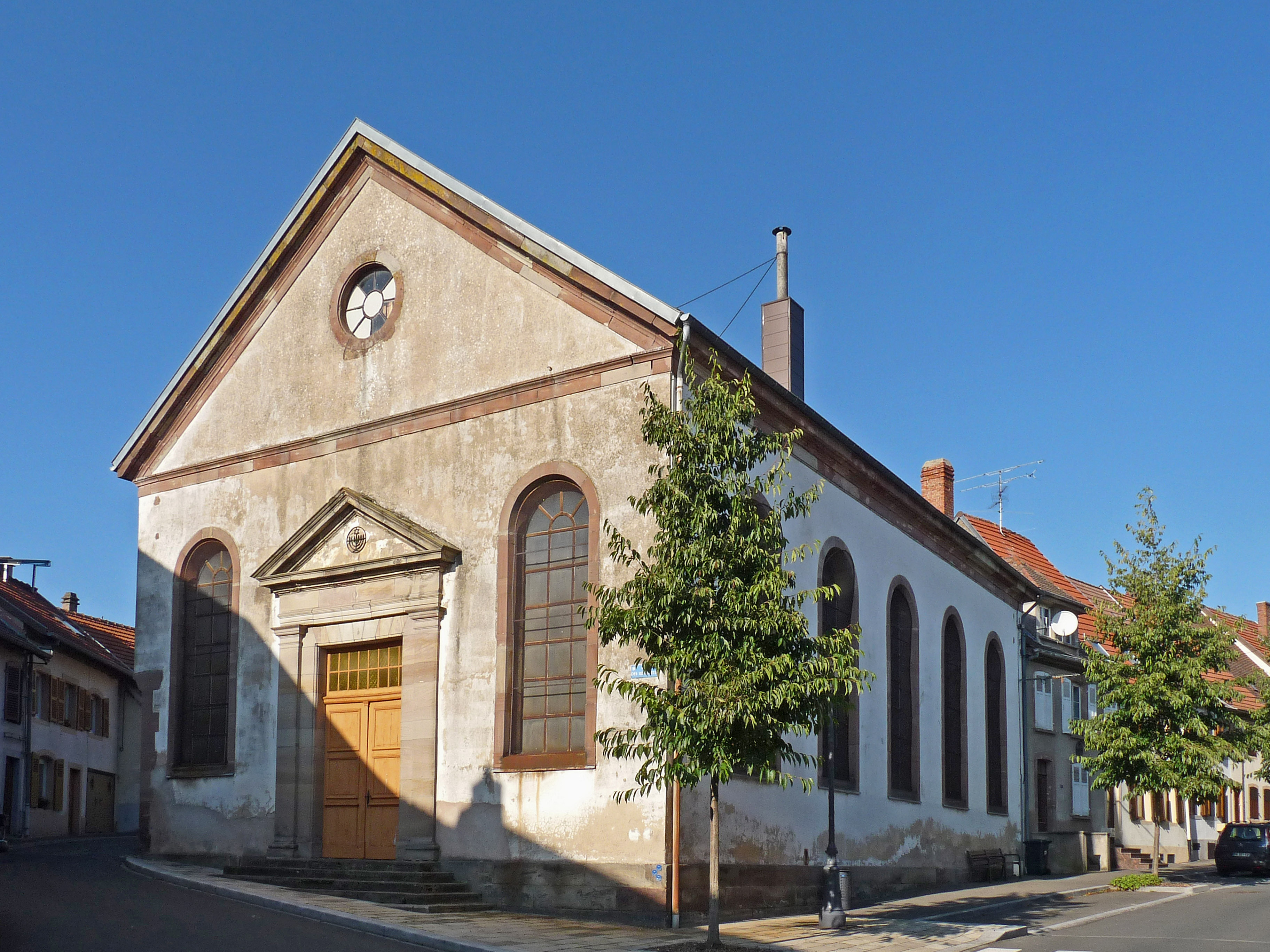 Sarre-Union (Bas-Rhin) : synagogue